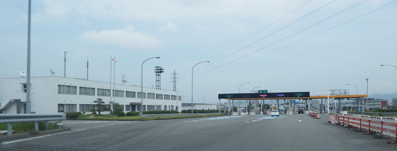 松山インターチェンジ出口